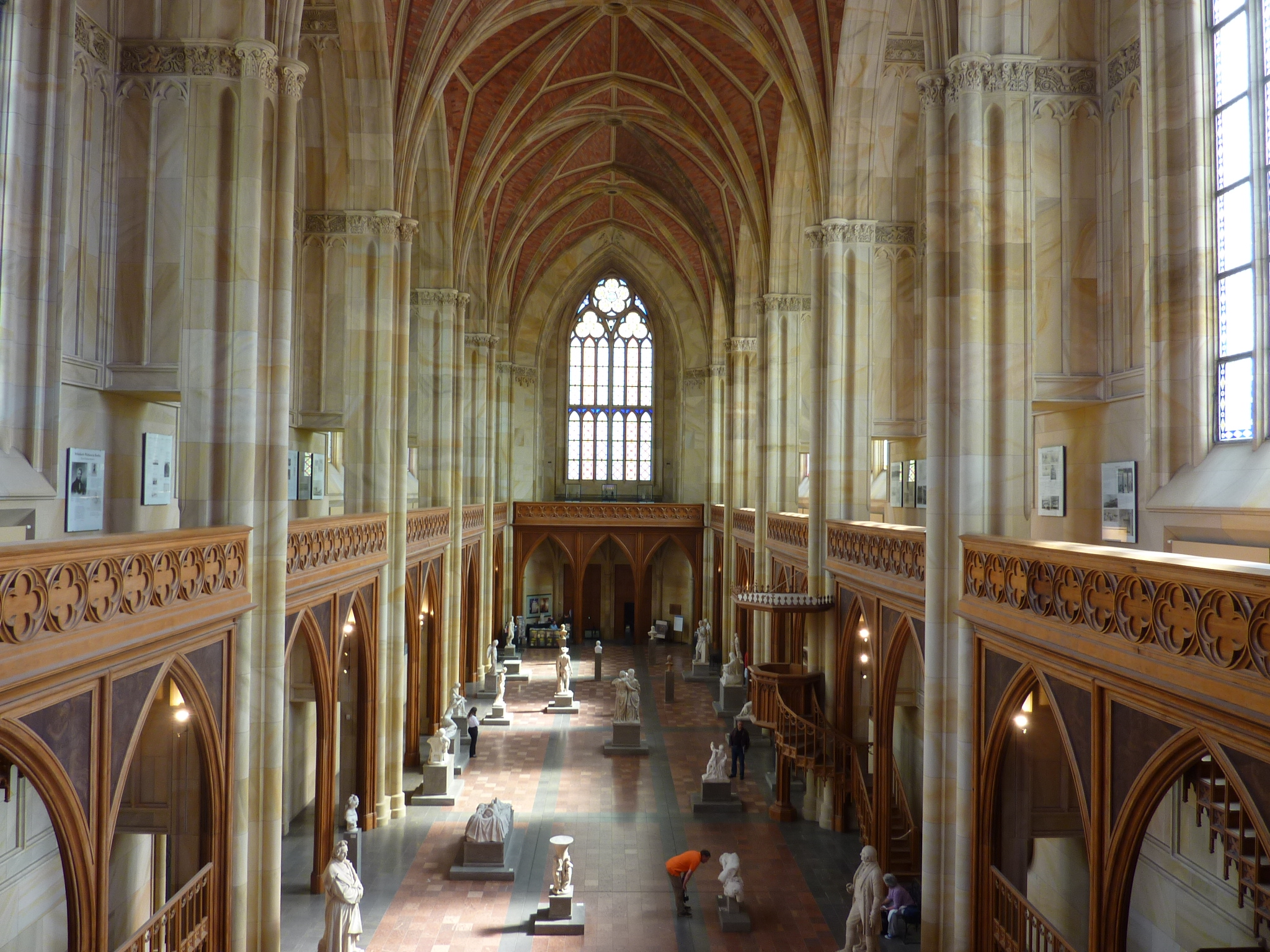 Friedrichswerdersche Kirche